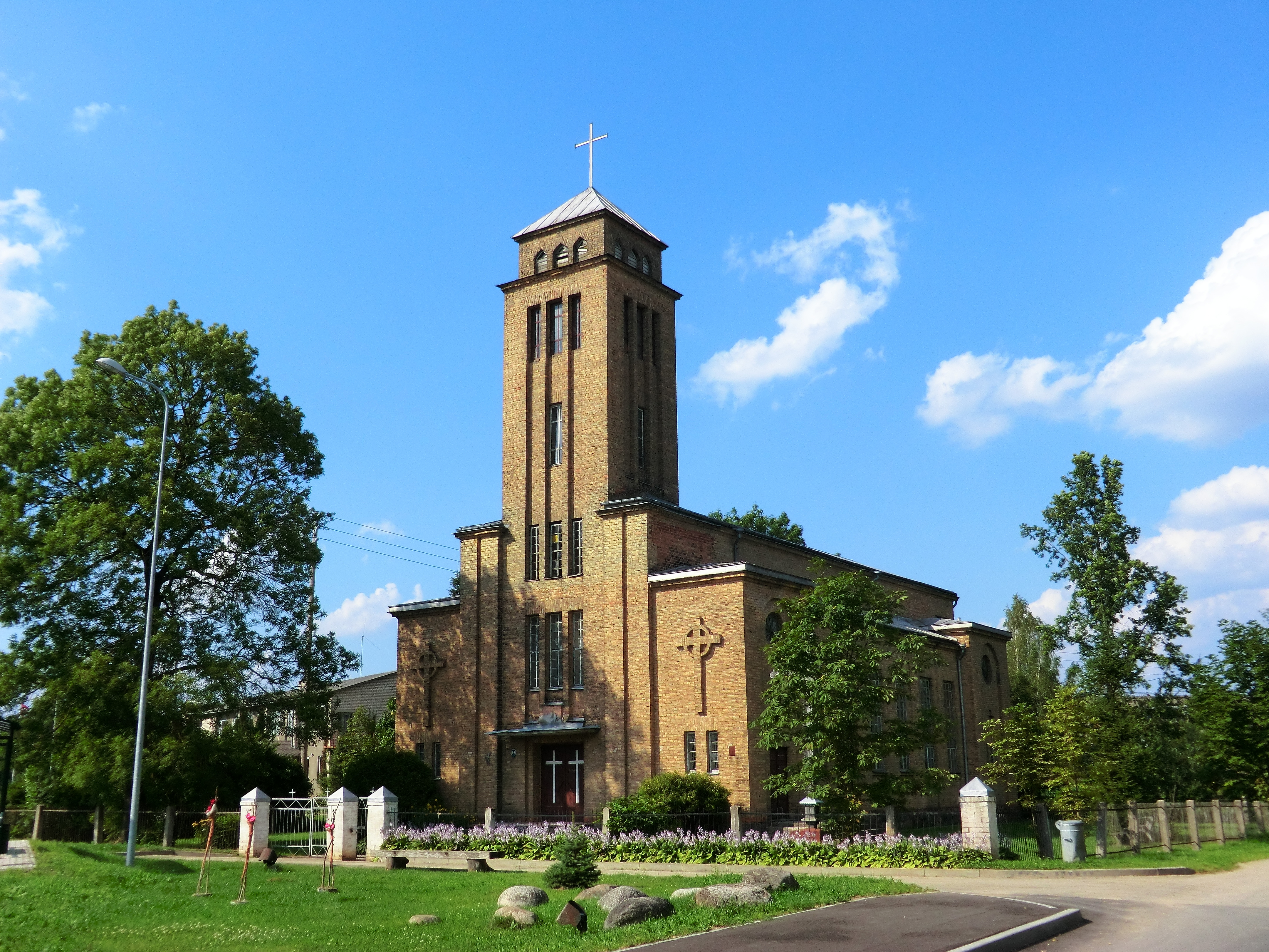 Aknīstes katoļu baznīca